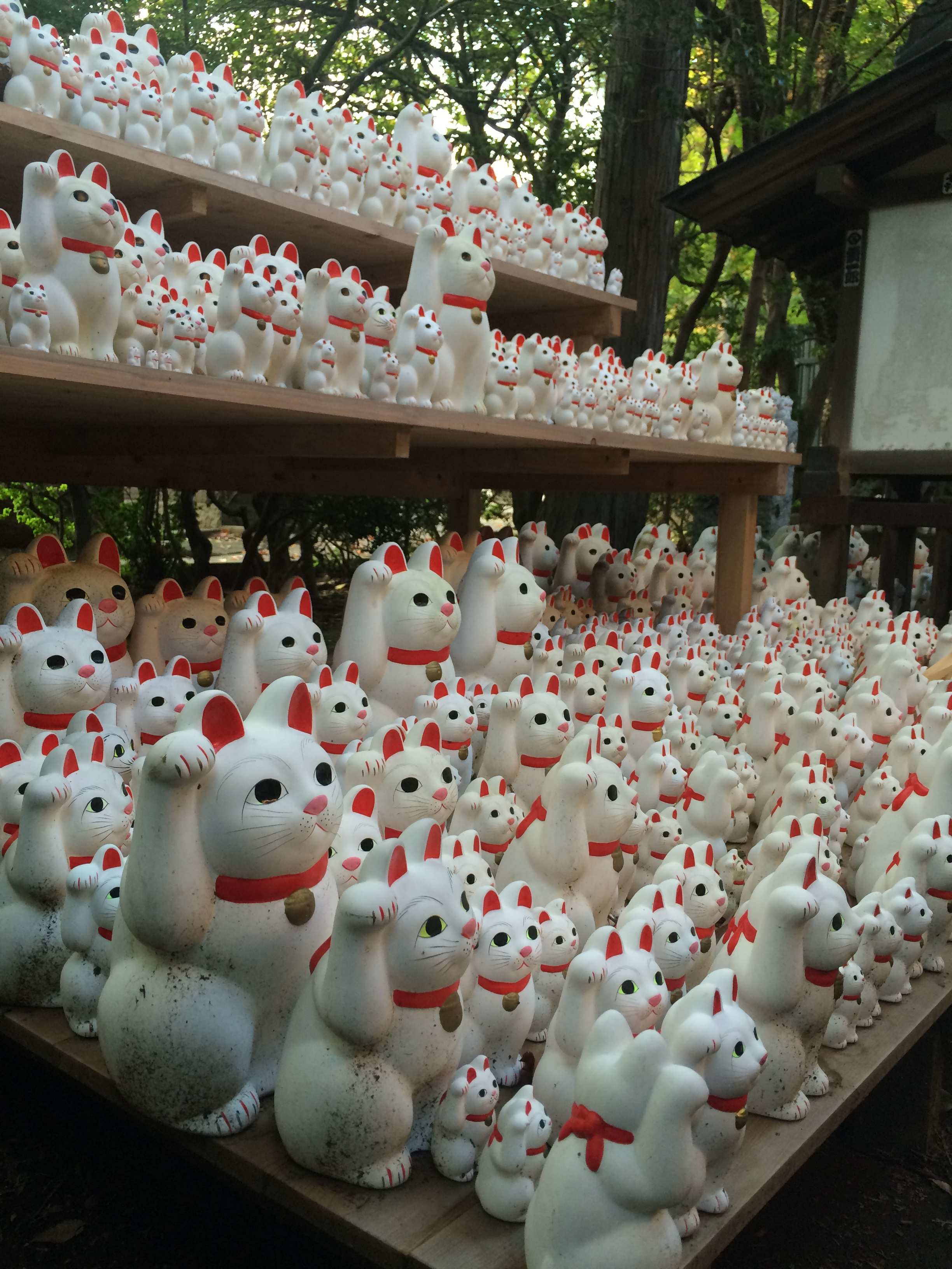 豪徳寺の招き猫 (Gotokuji manekineko, thanks to Y's lens)